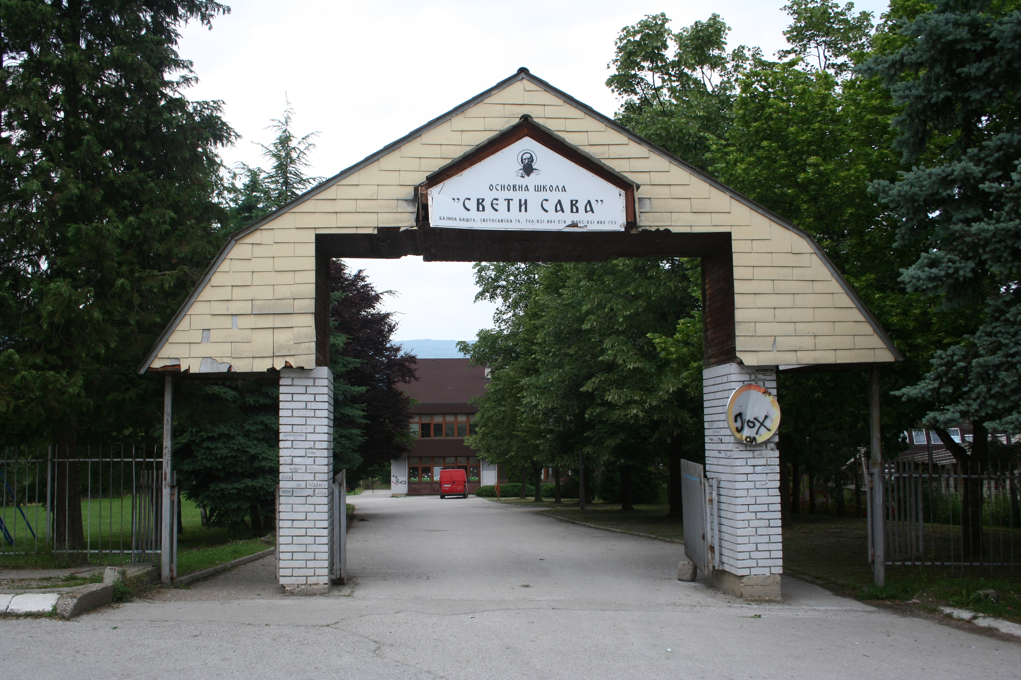 Bajina Bašta u maju 2017.